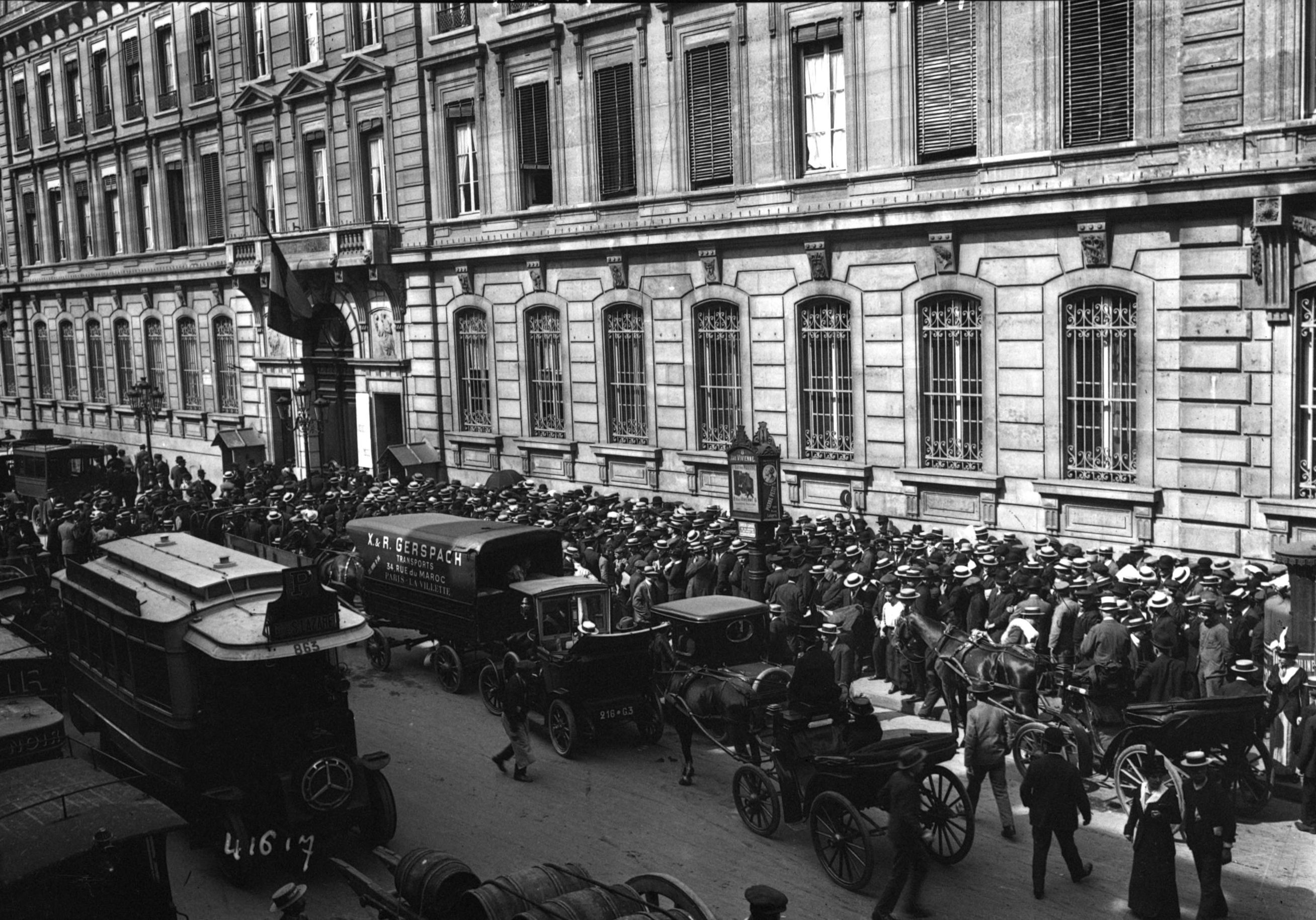 Foule devant le siège de la Banque de France à Paris, 39 rue Croix-des-Petits-Champs, lors de la crise monétaire de juillet 1914.